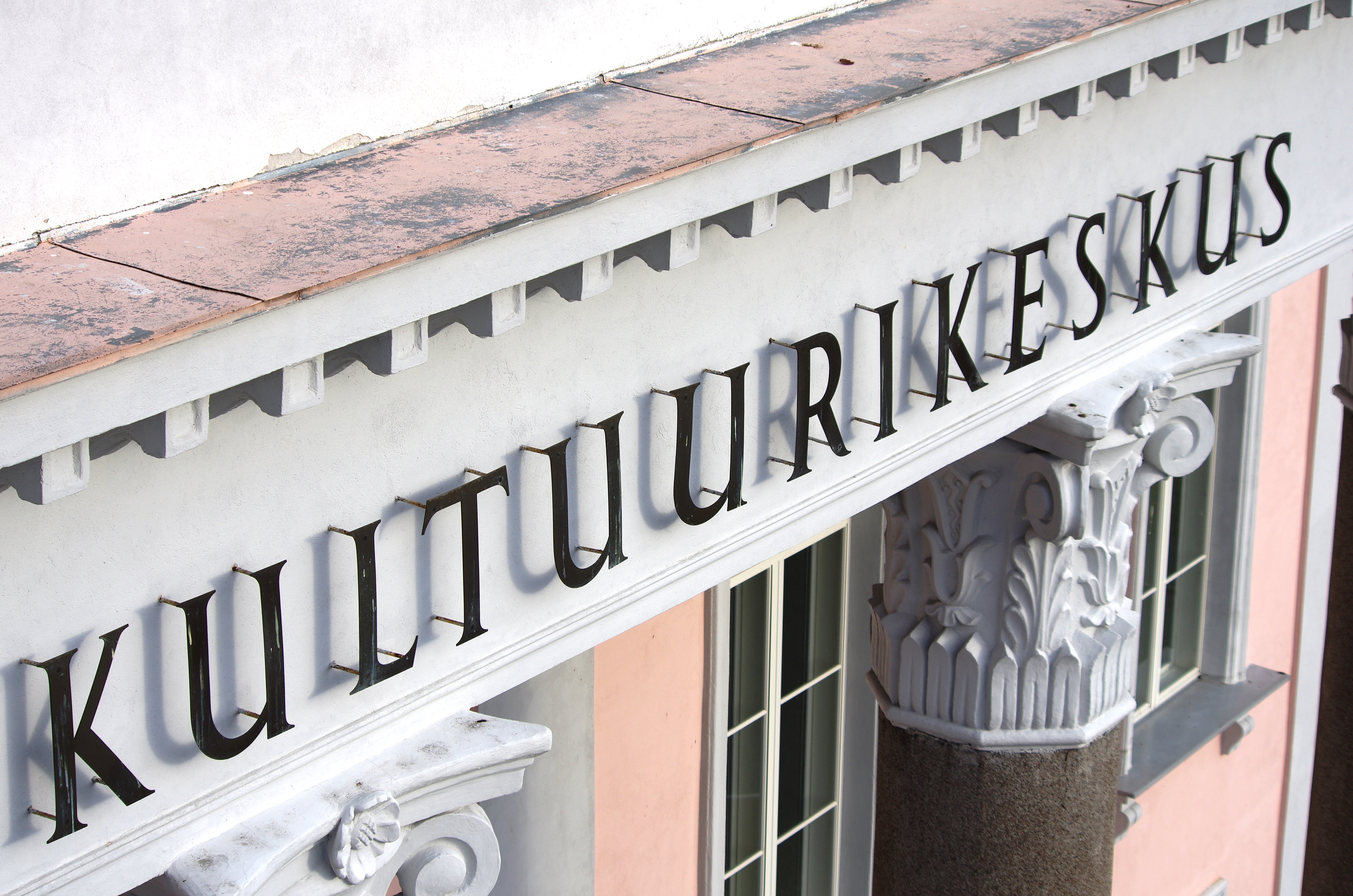 Keila Kultuurikeskuse silt